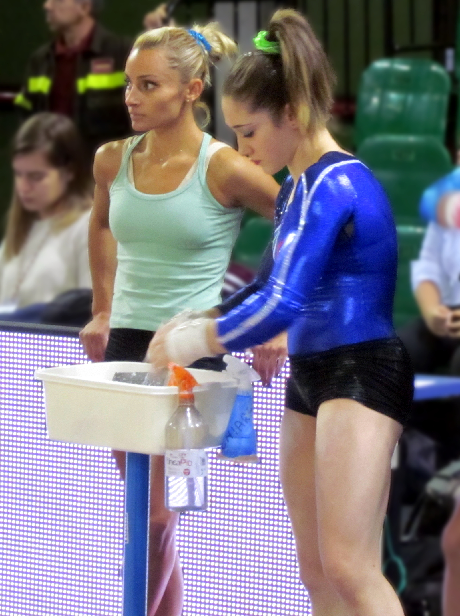 Vasiliki Millousi e Alessia Leolini al Grand Prix di Ginnastica 2013